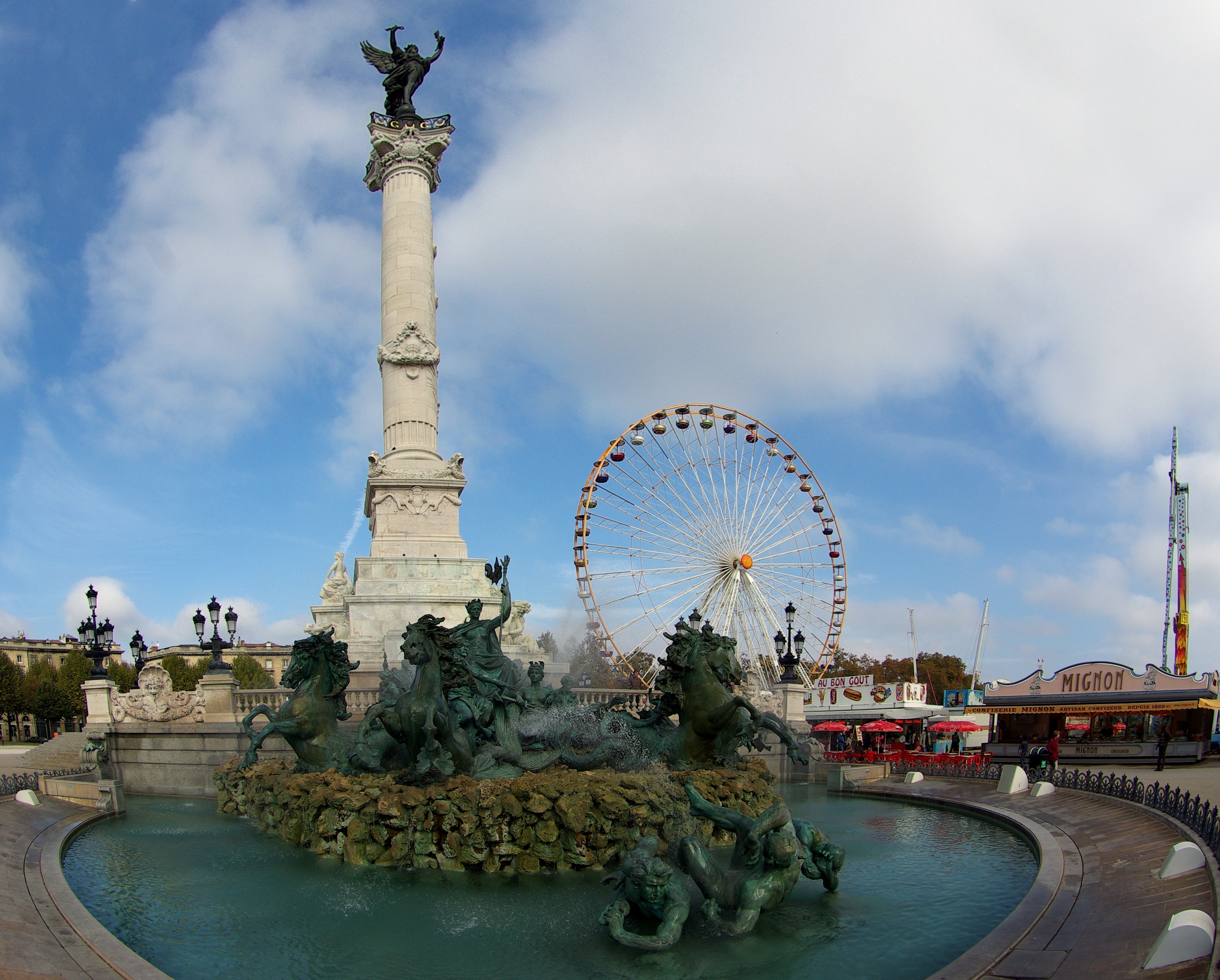 Grande roue (Ferris wheel) de la Foire aux Plaisirs, Place des Quinconces, Bordeaux, France